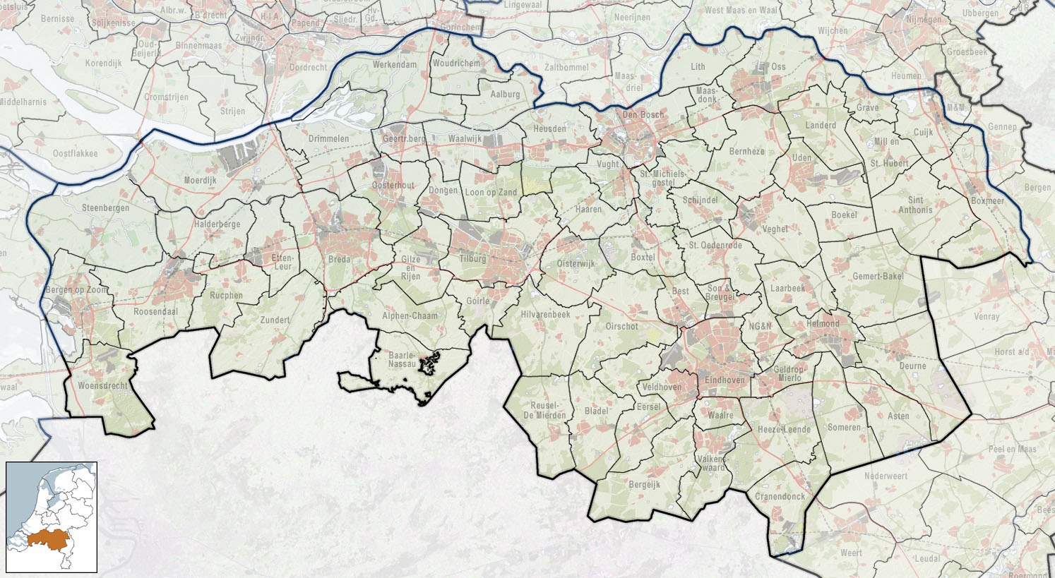 Referentiekaart van Provincie Noord-Brabant, met indeling van gemeenten (2010) en impressie van het landschap. Door Jan-Willem van Aalst, samengesteld uit publiek beschikbare geo-data: Referentie-ondergrond (kustlijn, steden, wegen) gerasterd uit de OpenStreet Map OSM. ( Inhoud is beschikbaar onder de Creative Commons Attribution-ShareAlike 3.0 license. Referentie-ondergrond op water bewerkt vanuit Gebruik is vrij met bronvermelding NLR en ESA. Vectorgrenzen van gemeenten en regio's vrij ter beschikking gesteld met dank aan cartografen van brandweerregio's Hollands-Midden en IJsselland; gerasterd in Photoshop. Hoogte-aanduidingen (reliëf) gerasterd uit de AHN Viewer ( gebruik is vrij met bronvermelding (c) AHN, Overige kenmerken op de kaart: eigen tekenwerk van Jan-Willem van Aalst, op basis van gerasterde gemeentegrenzen.